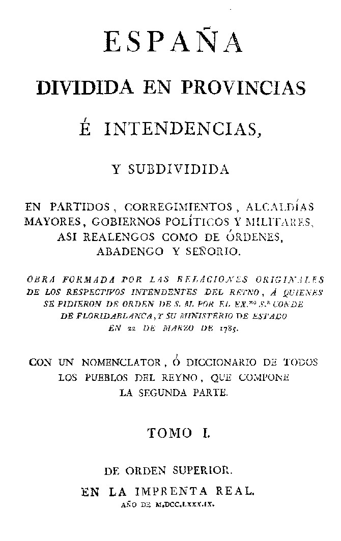 Encabezamiento Orden de 22 de marzo de 1785. "España dividida en provincias"